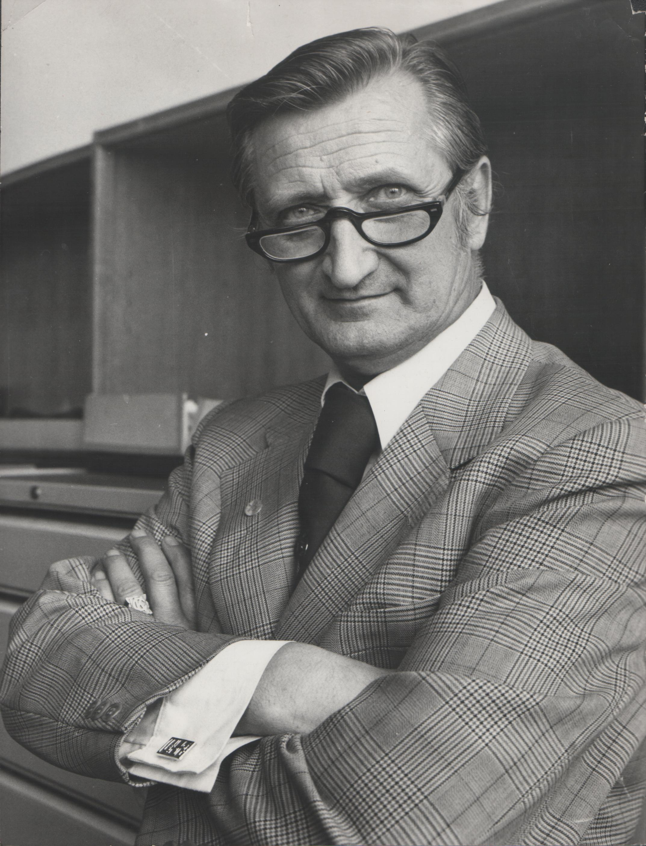 Stevan Kragujević, portet (po ovlašćenju Tanje Kragujević)